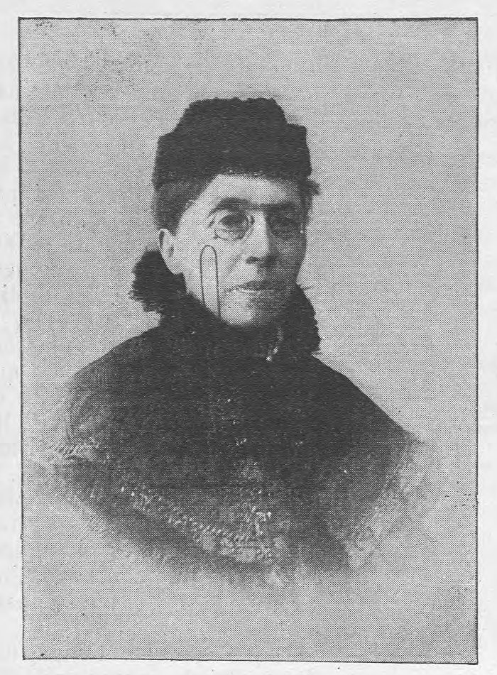 Portrait de Eugénie Potonié-Pierre